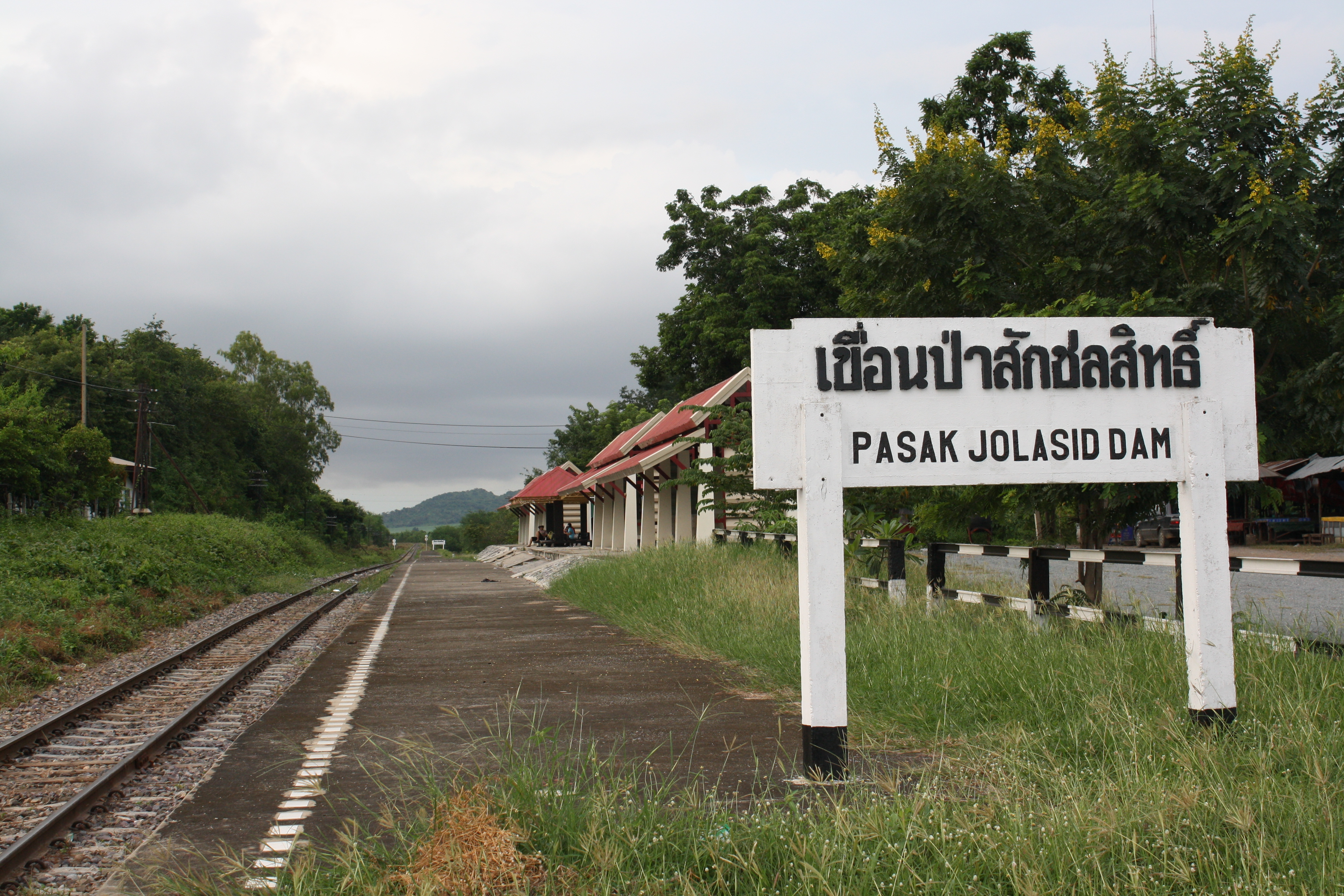 ภาพที่หยุดรถไฟเขื่อนป่าสักชลสิทธิ์ จังหวัดลพบุรี